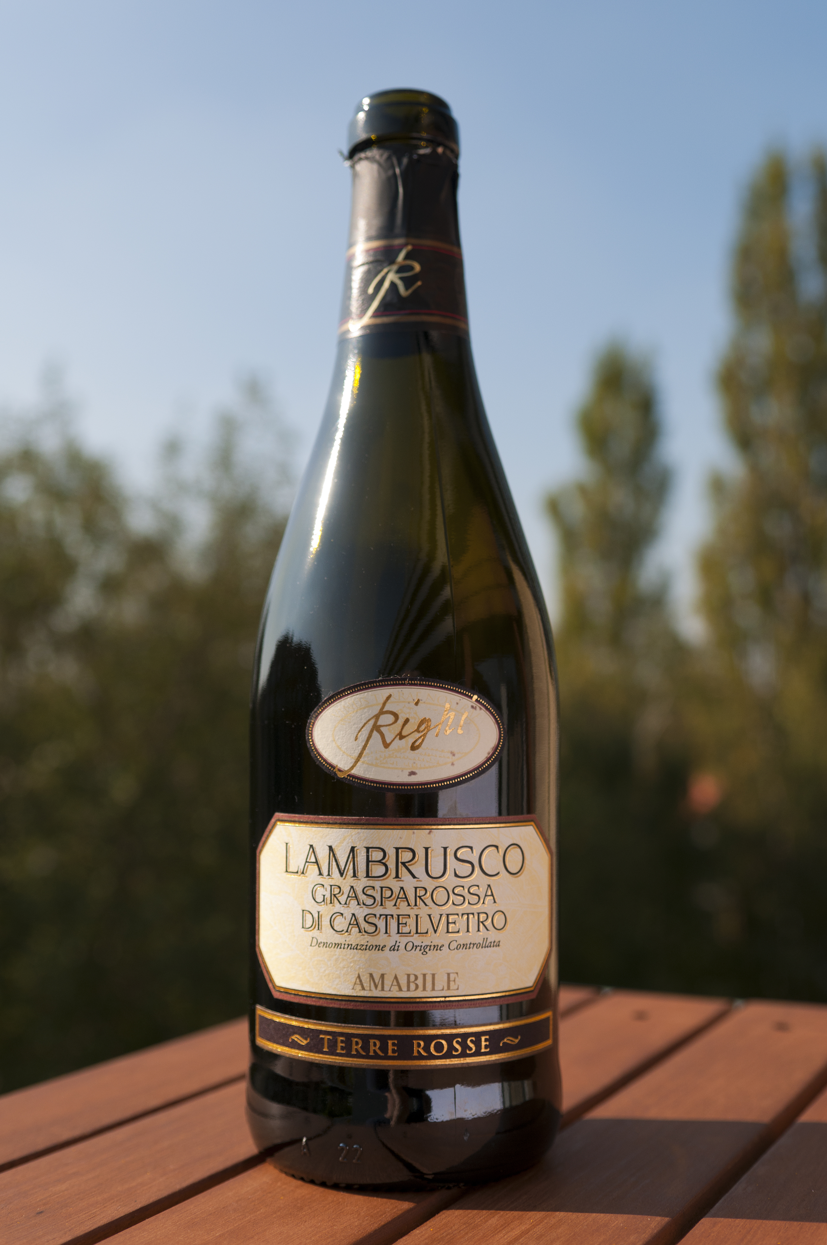 Right Lambrusco Grasparossa di Castelvetro Amabile Terre Rosse